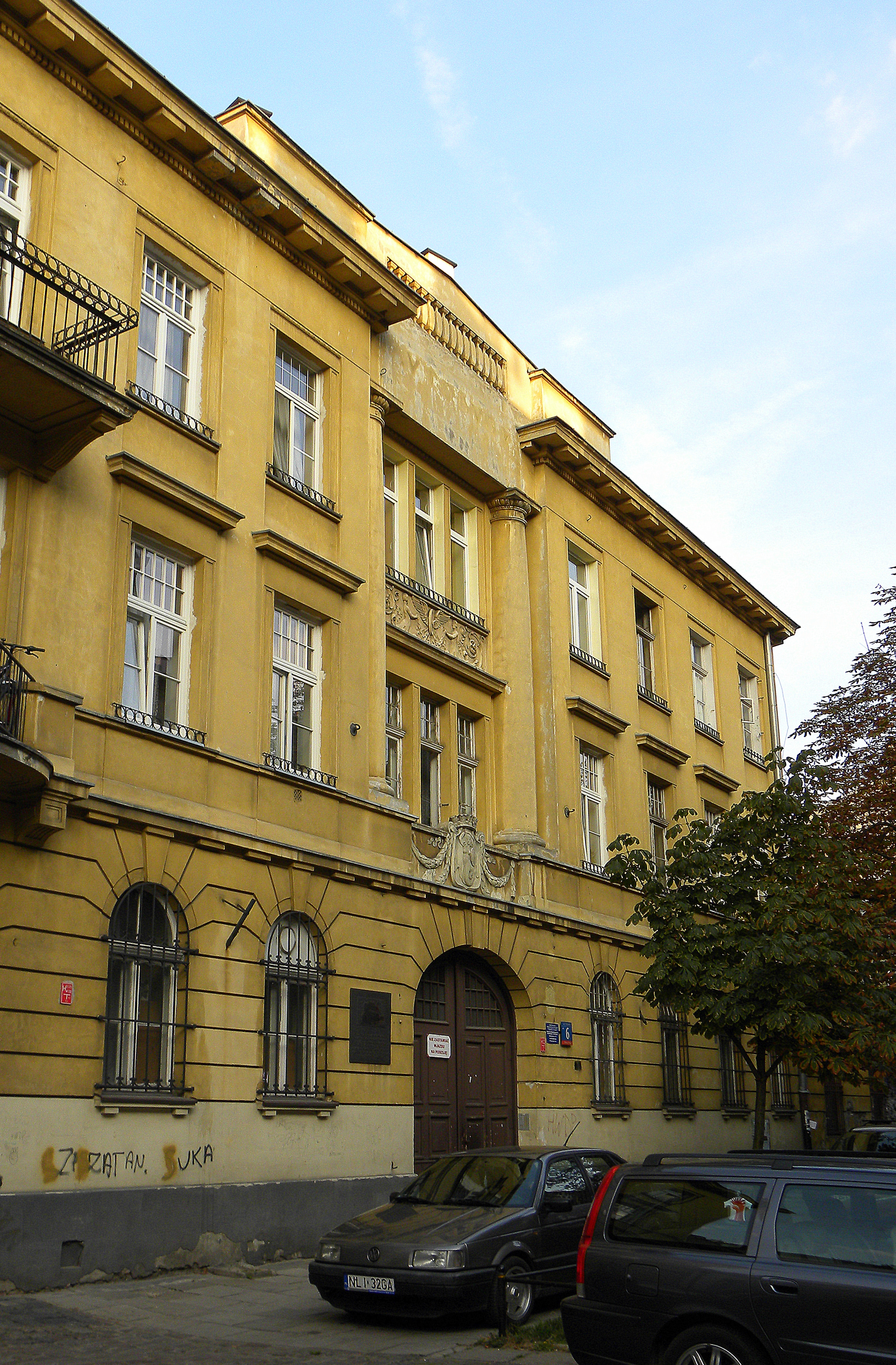 Warszawa ul. Inżynierska 6 - dawna remiza tramwajowa, 1921 (zabytek nr. rejestr. dec.240/2010)